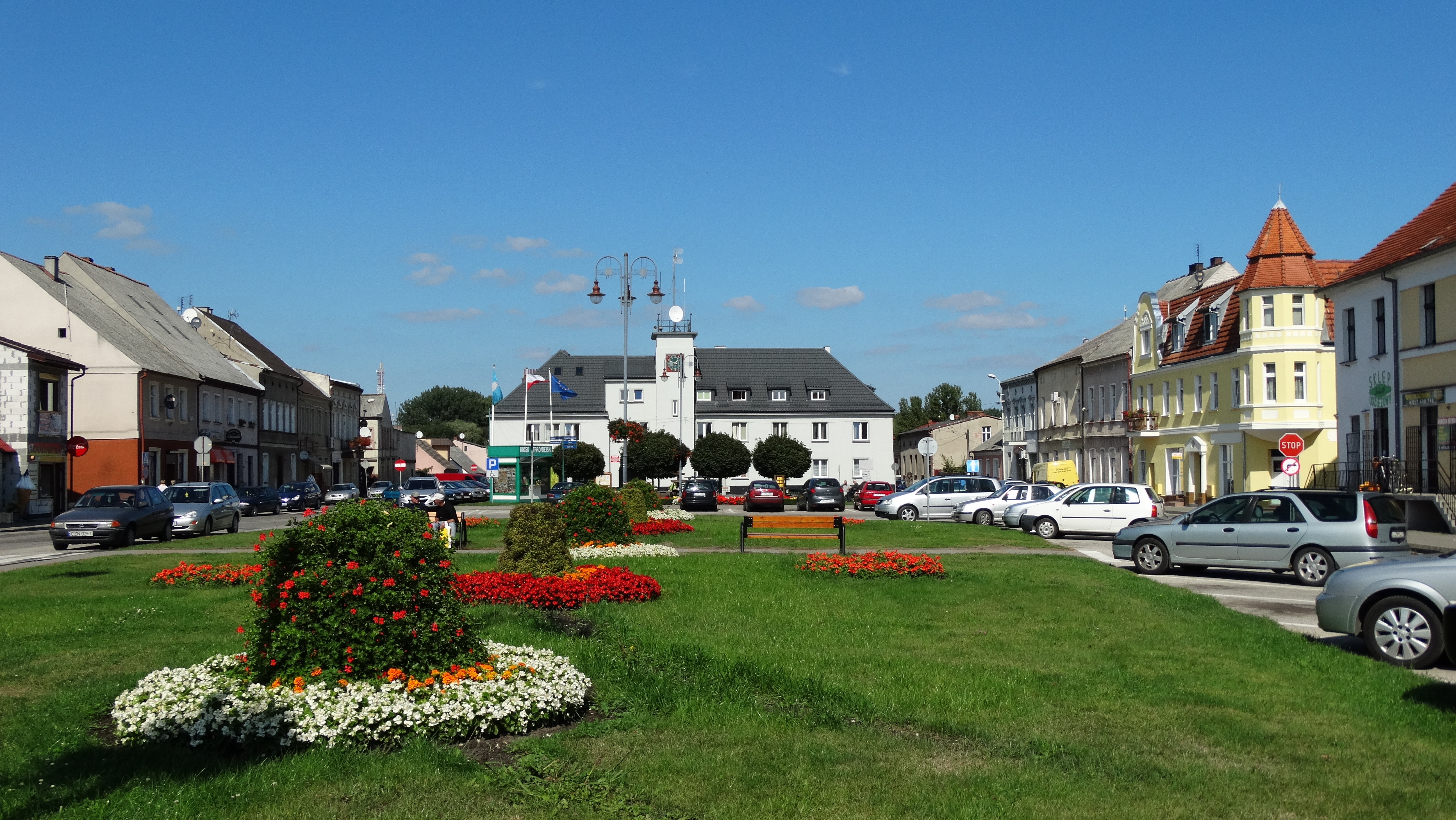 Łabiszyn, Plac Tysiąclecia (Rynek)